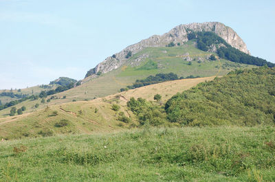 Piatra CraiviiRomână: Piatra Craivii